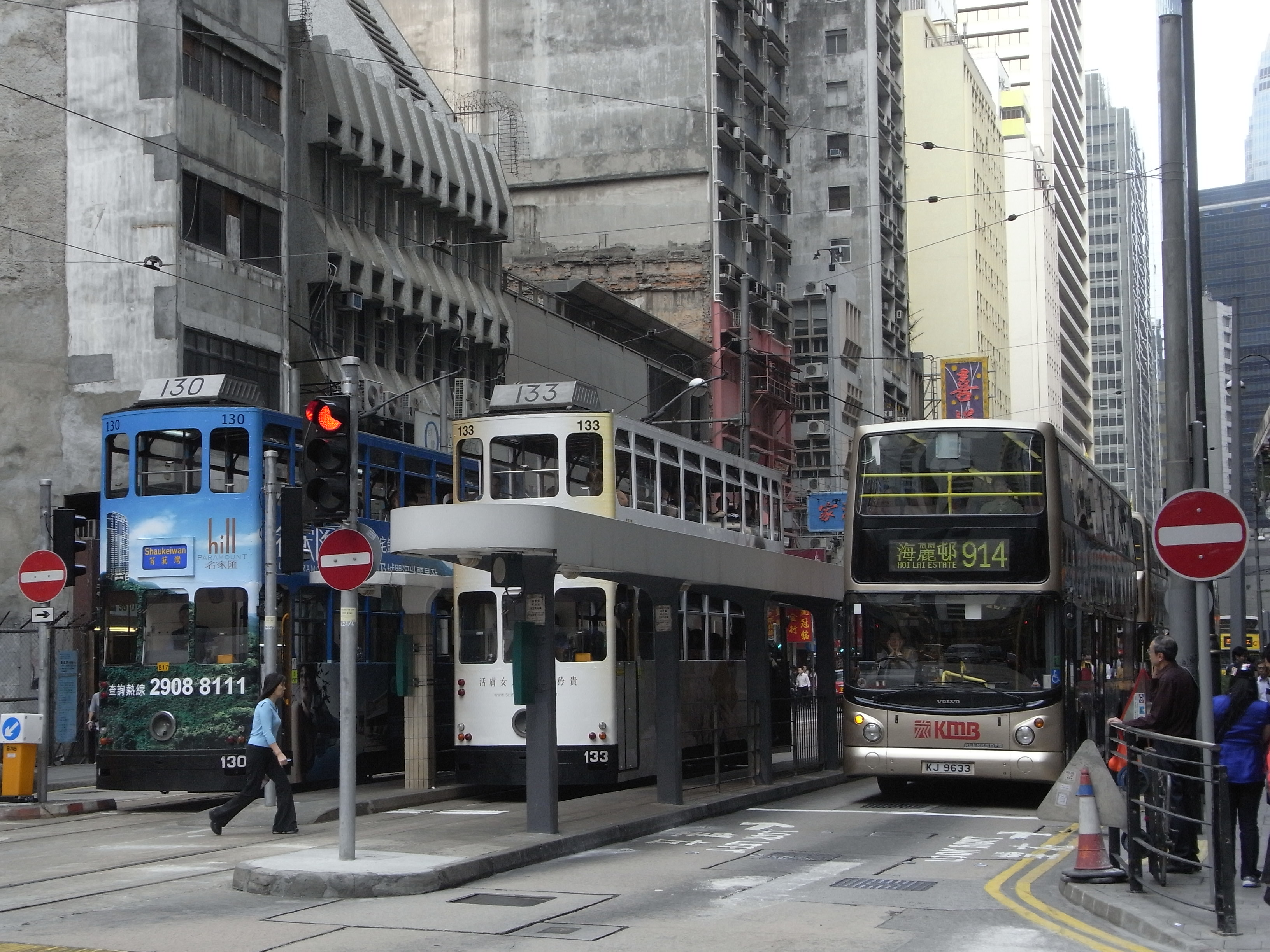 上環電車總站